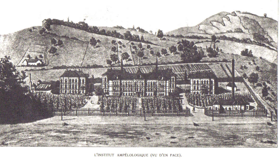 A Herman Ottó úti mezőgazdasági kutatótelep képe megépülte után, Budapest, Herman Ottó út 15. (1907)